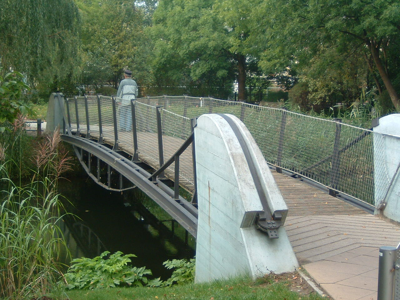 Lübz Brücke